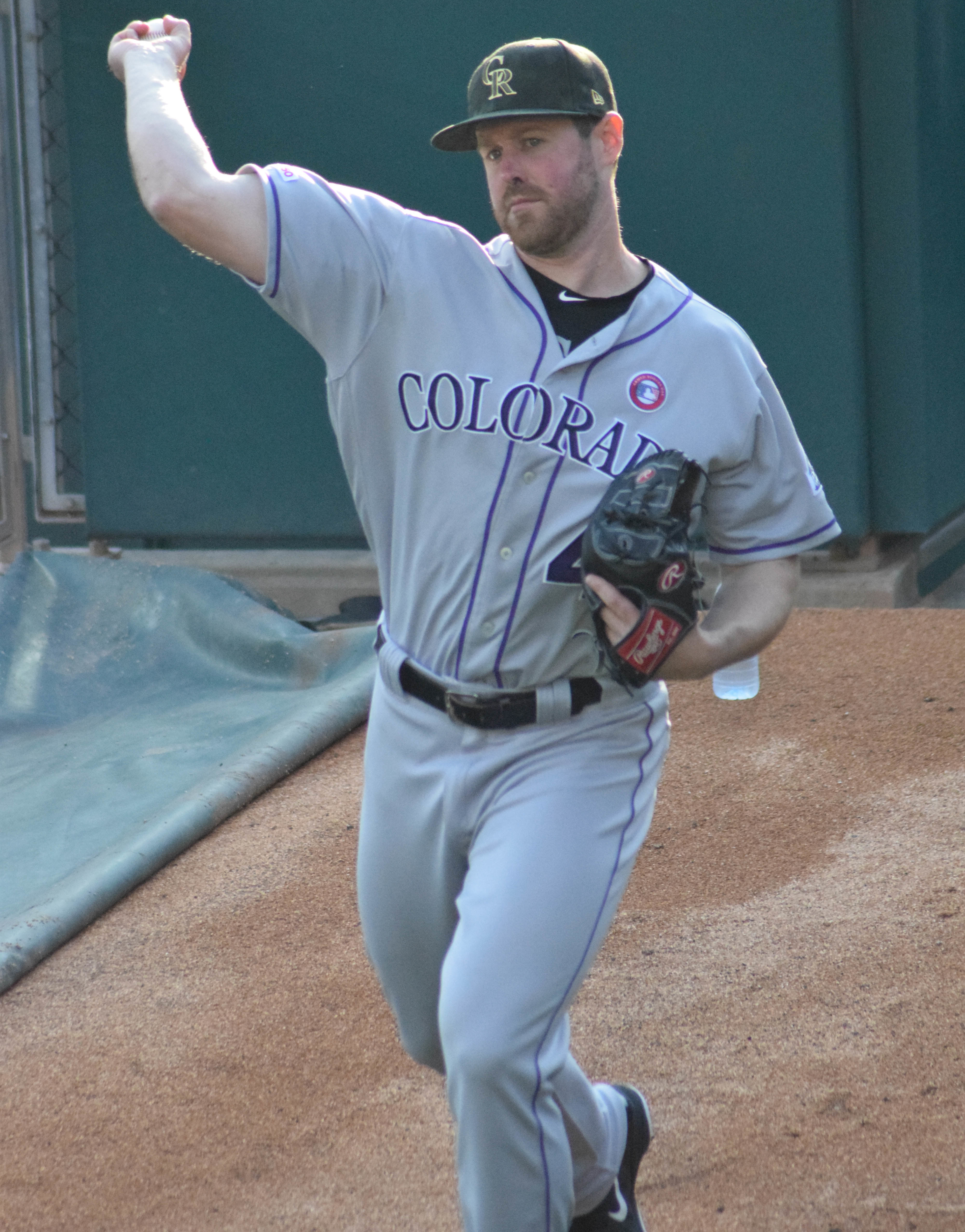 Scott Oberg